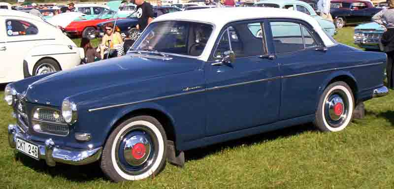 Volvo P 12104 4-Door Sedan 1959